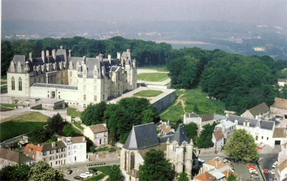 Ecouen dominant la Plaine de France (Val d'Oise)